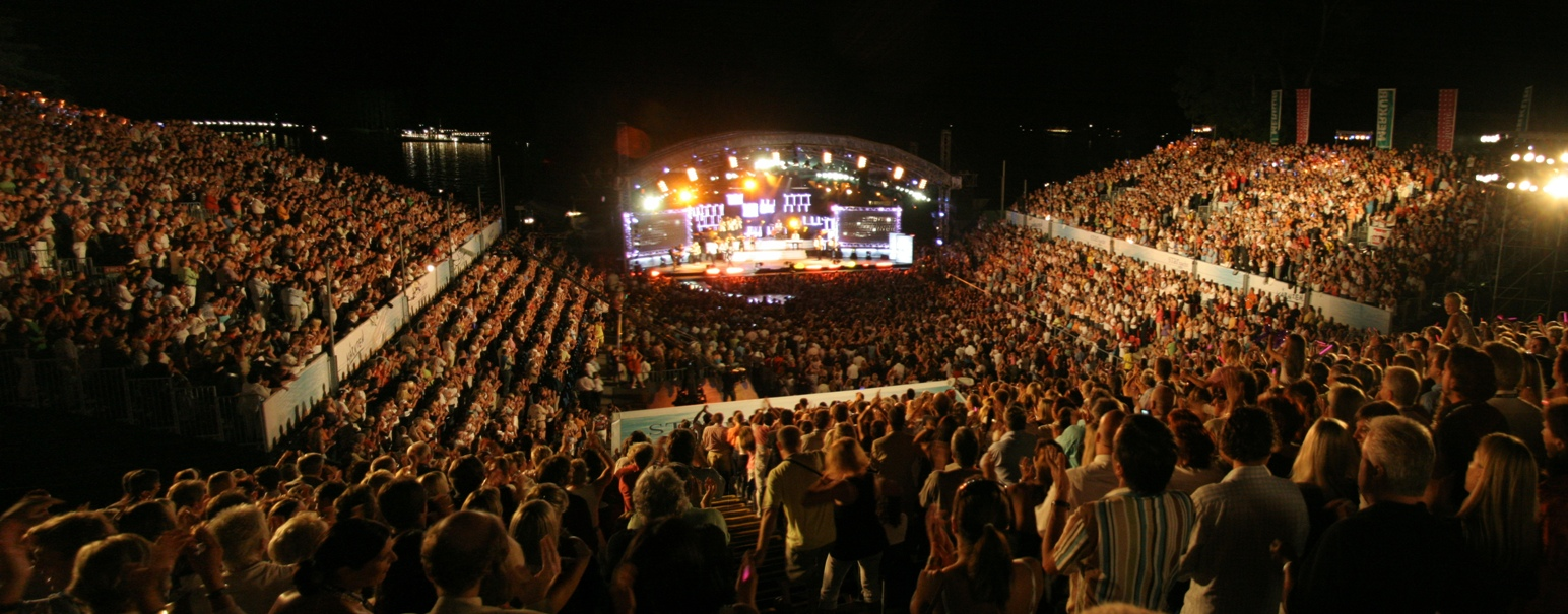 Panoramaaufnahme der Bühne